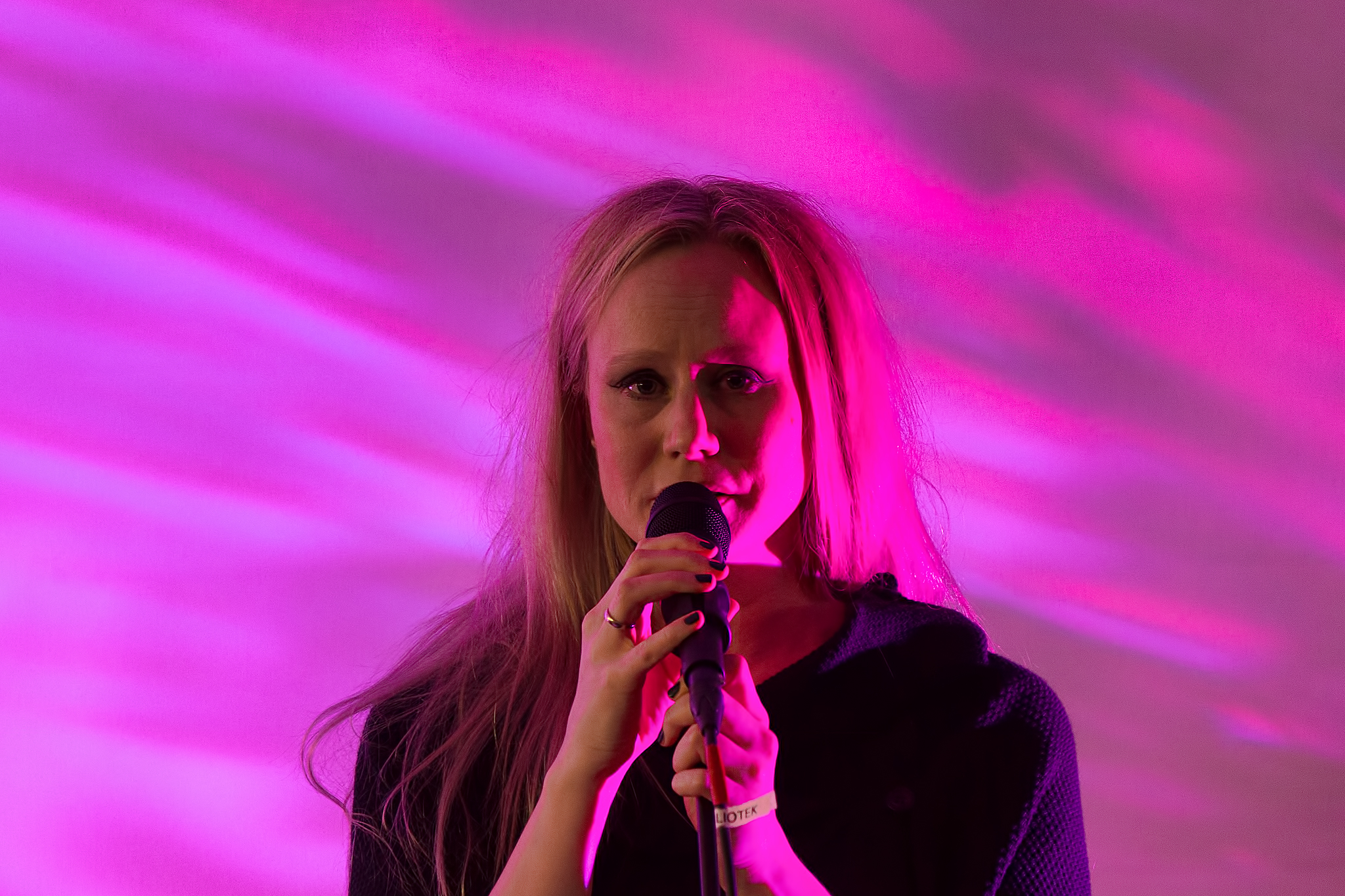 Konsert med søsknene Wallumrød i musikkavdelingen 7. september